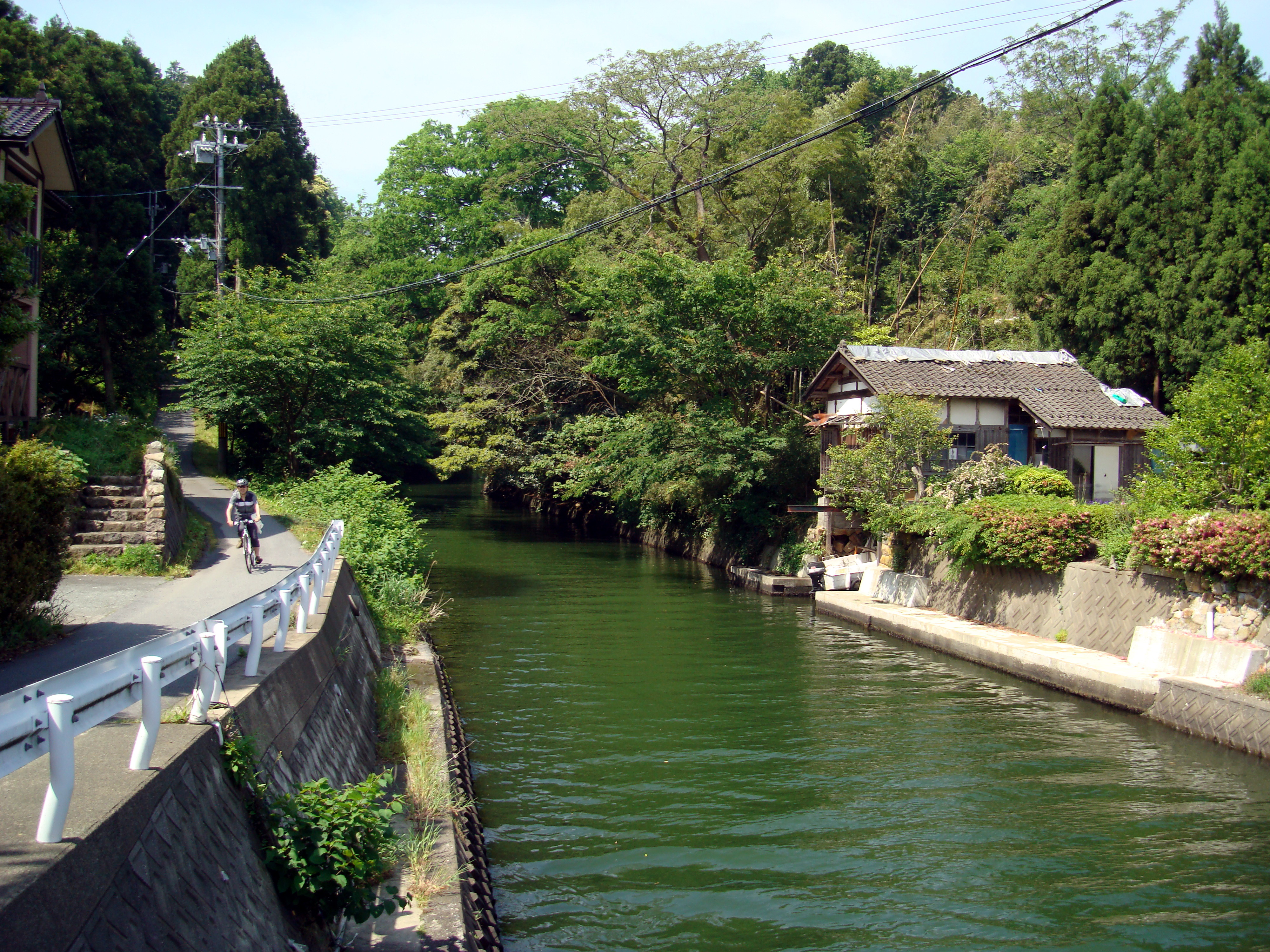 浦見川（別名 浦見運河）